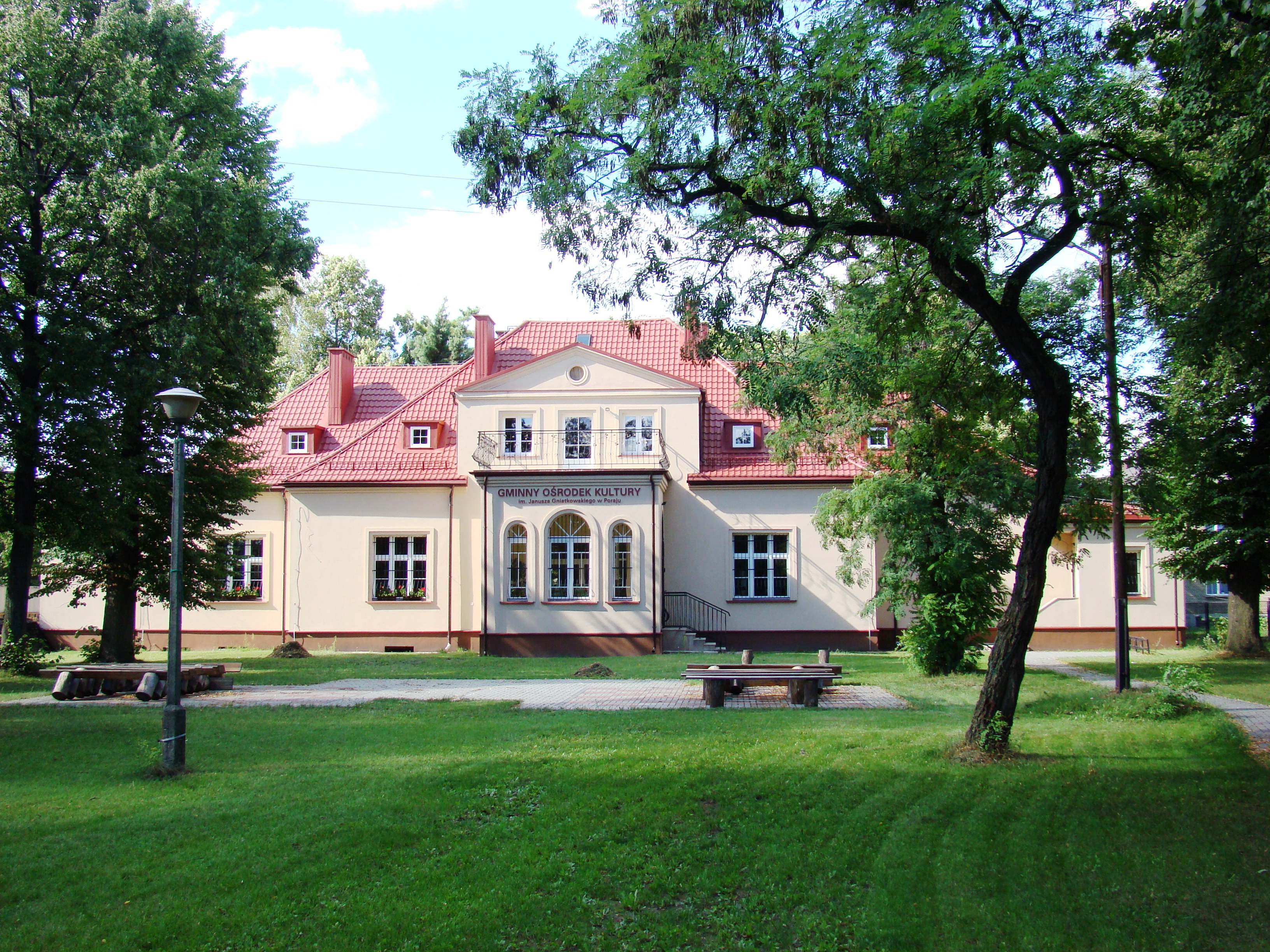 Gminny Ośrodek Kultury w Poraju, wybudowany w latach 30. XX wieku jako pałacyk przez Wacława Koniecznego.